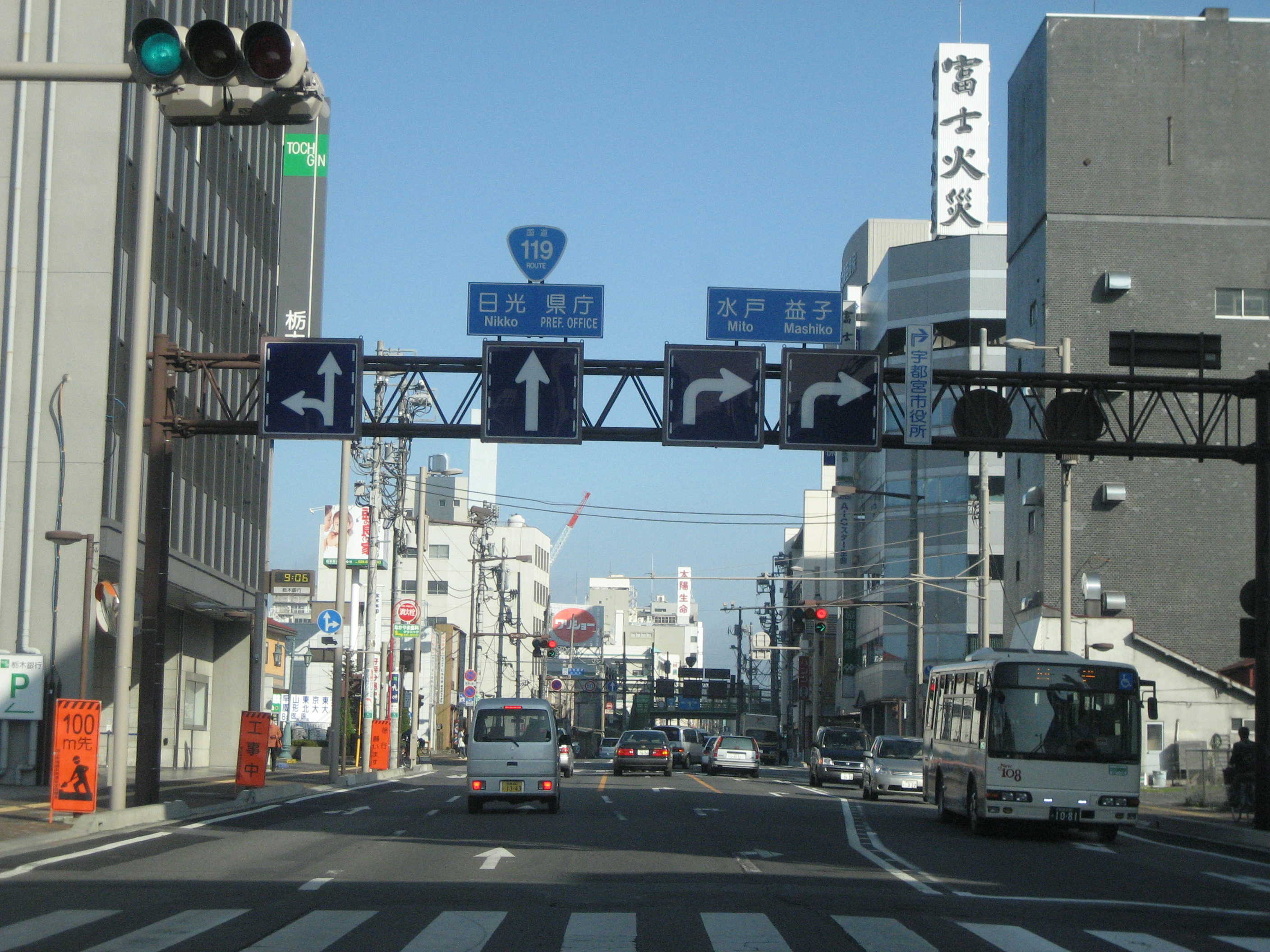 国道119号宇都宮市内